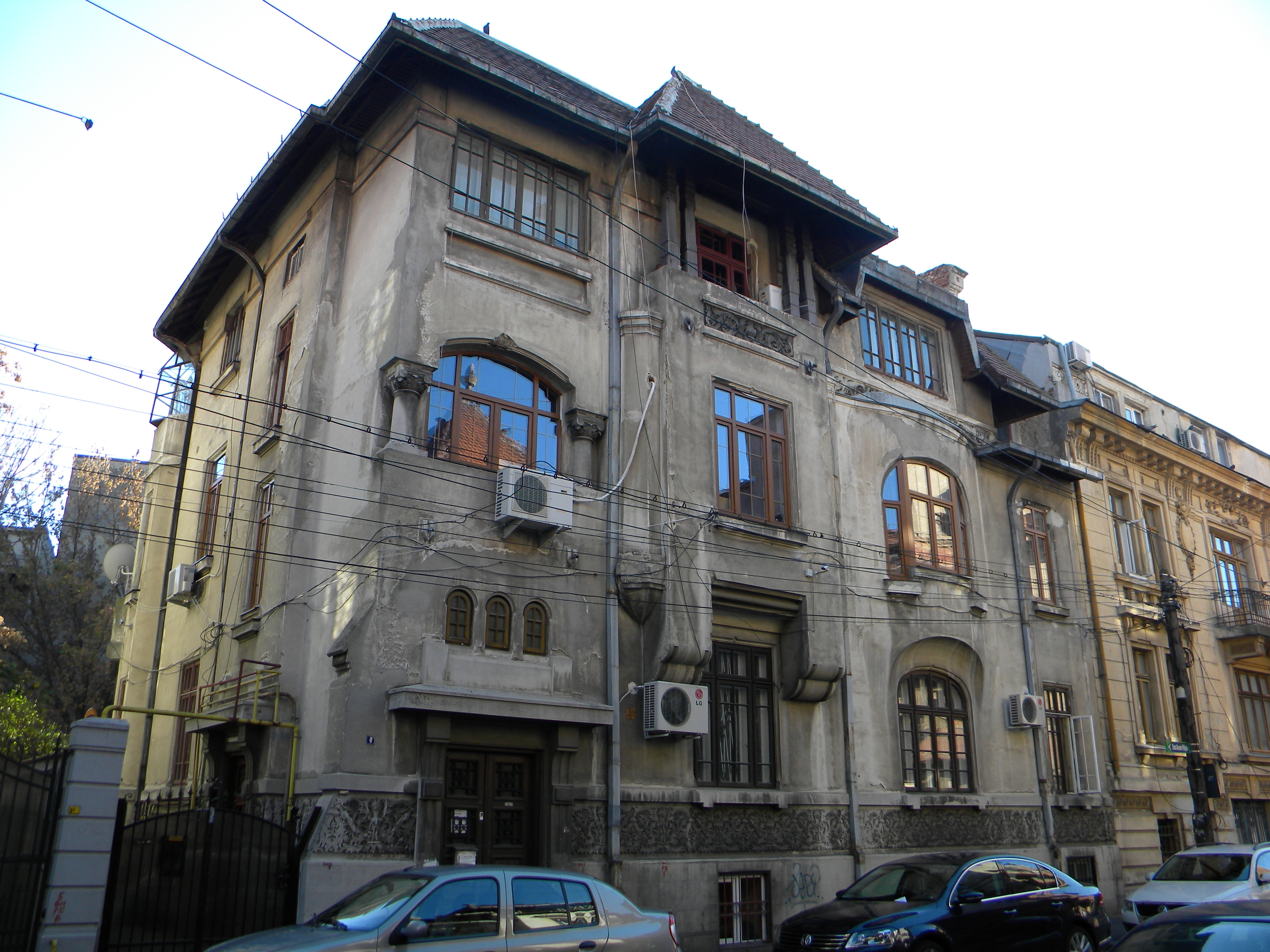 Bucuresti, Romania, Str. Alexandru Philippide nr. 4, sect. 2 (Cod B-II-m-B-19377) (1 prim)